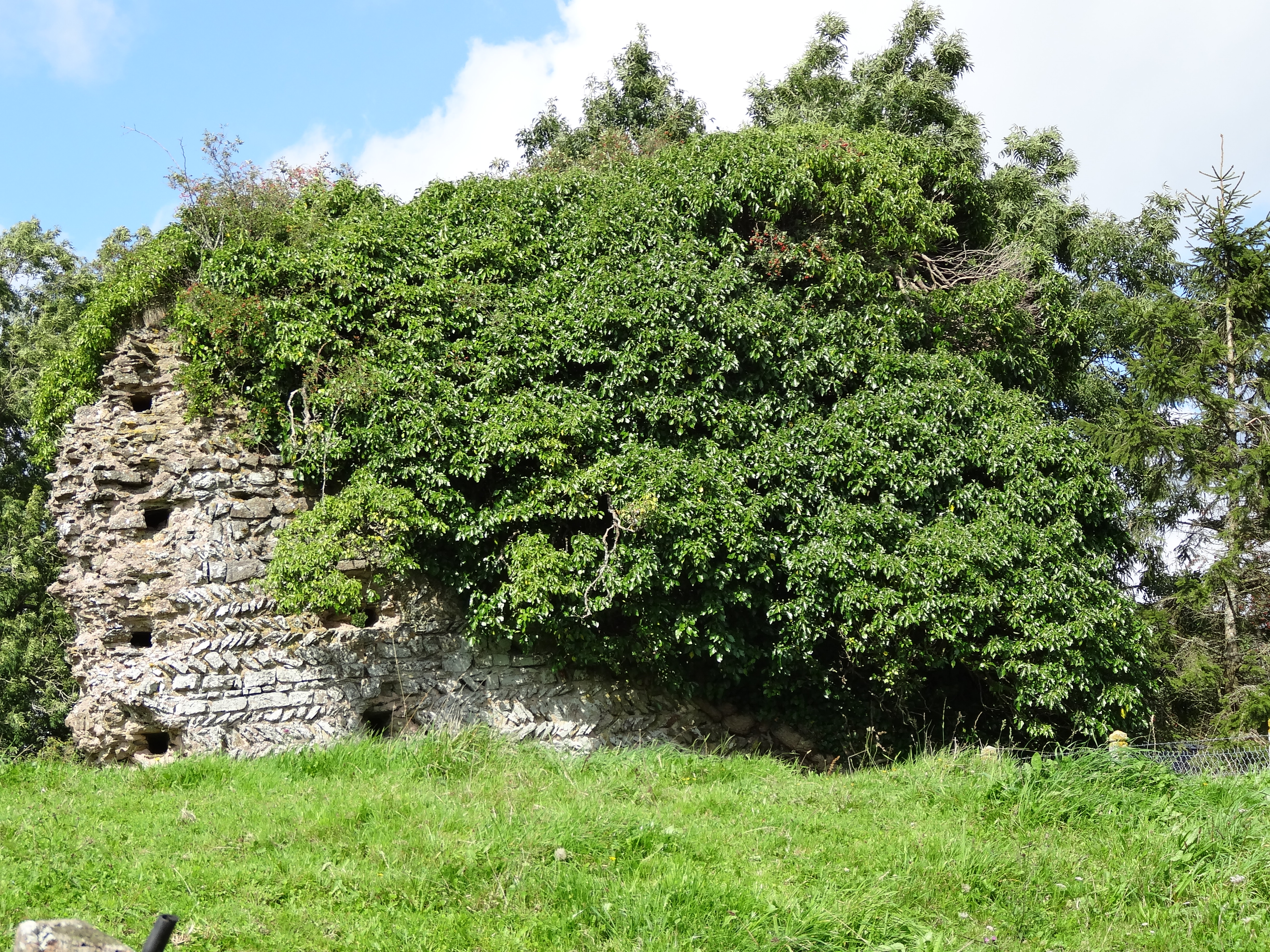 Le Plessis-Grimoult ,vestige de mur d'enceinte fortifiée du XIe siècle en arête-de-poisson. Cette enceinte était isolée du village par un rempart de terre doublé d'un large fossé